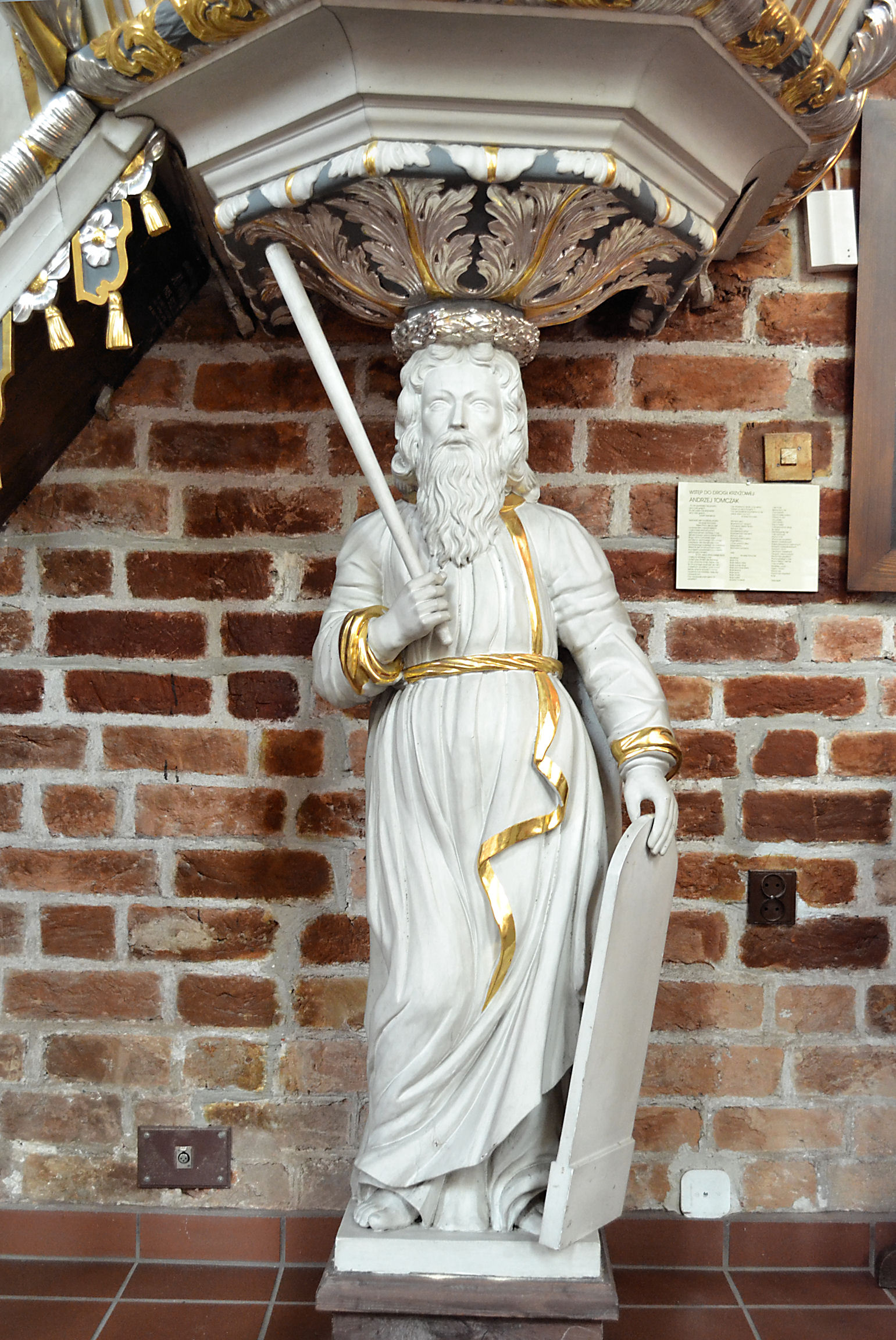 Marianowo - zespół klasztorny cystersów